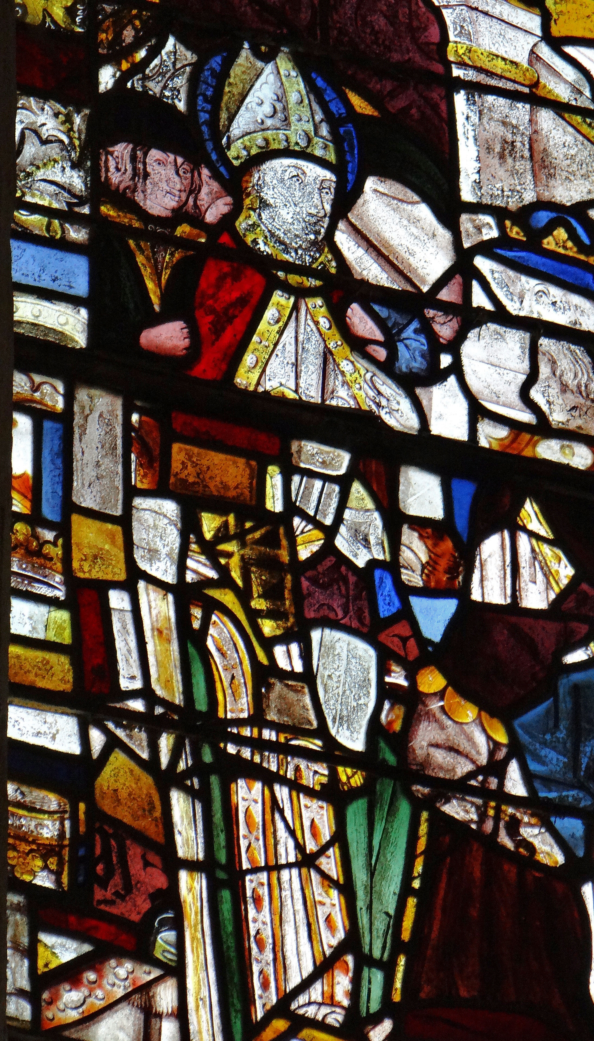 Salviac - Église Saint-Jacques-le-Majeur - Restes de vitraux anciens du Martyre de saint Eutrope.